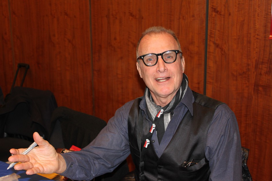 Marshall Bell (Tulsa (Oklahoma), 28 september 1942) is een Amerikaanse acteur die in diverse films en televisieseries heeft gespeeld. -- Signeersessie tijdens de conventie "Moviedays" op 28 en 29 november 2009 in Braunsweig, Duitsland.